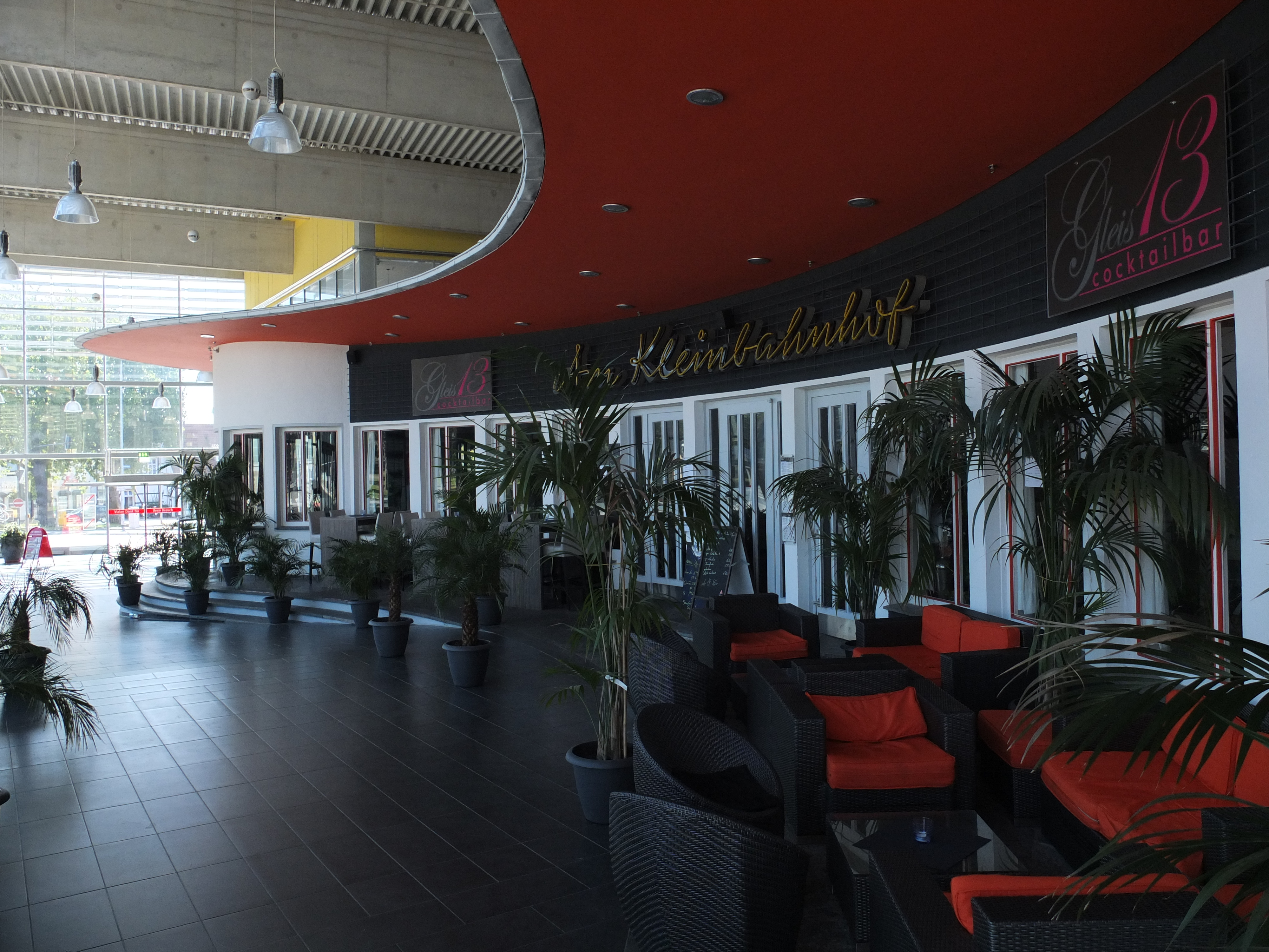 Ehemalige Gaststätte „Am Kleinbahnhof“, Soest This is a photograph of an architectural monument.